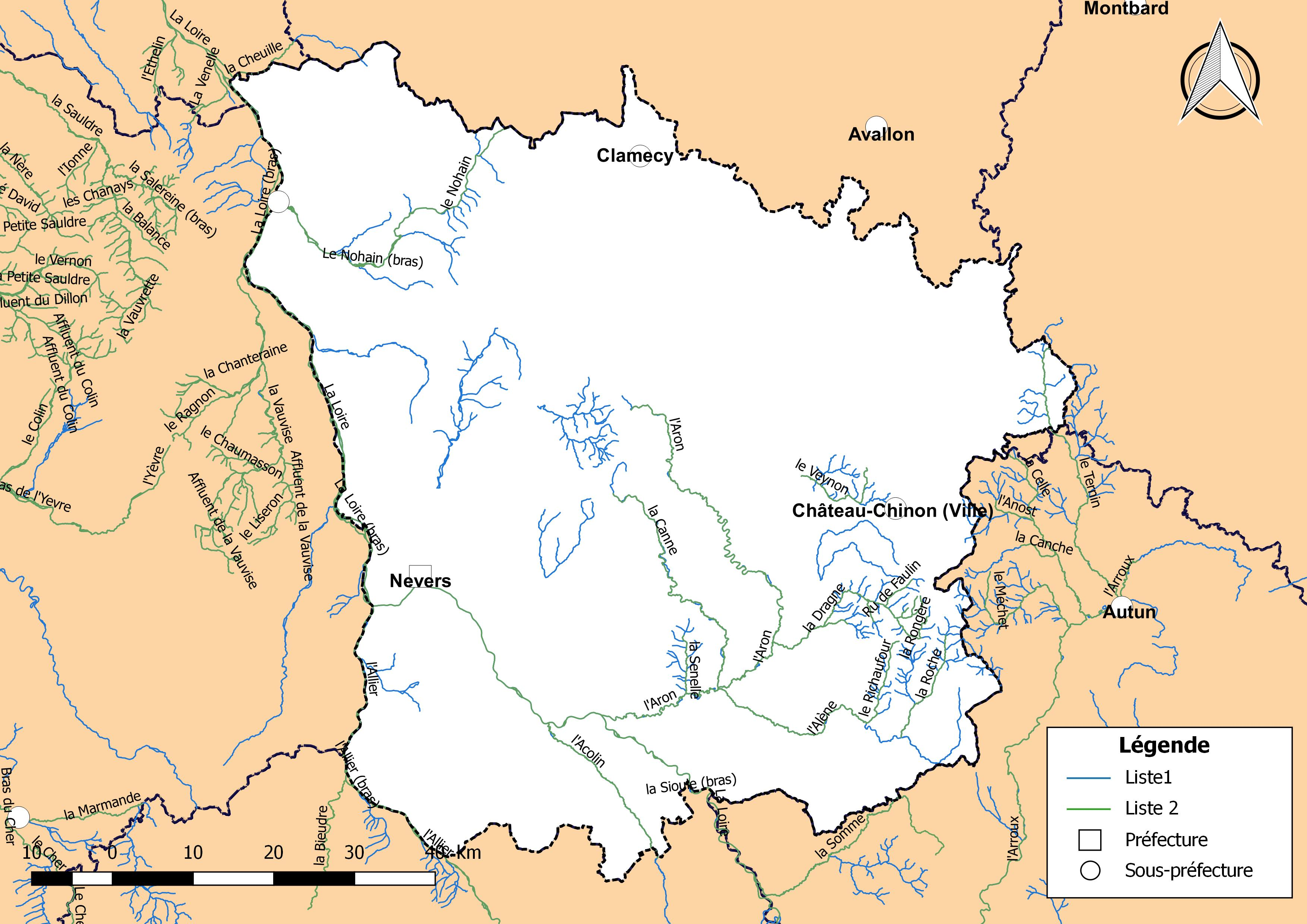 Classement des cours d'eau du département de la Nièvre (France) au titre de la continuité écologique (article L214.17 I du Code de l'environnement).